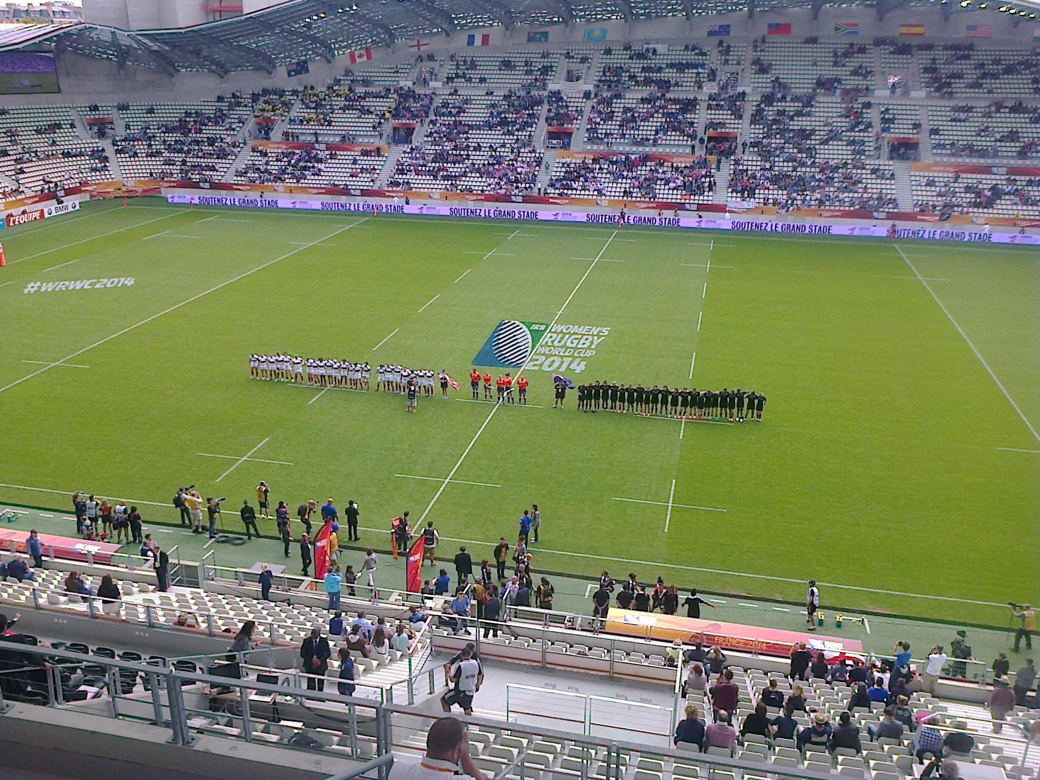 Présentation des équipes lors du match Etats-Unis - Nouvelle-Zélande du 17 août 2014 au stade Jean-Bouin (match pour la 5ème place de la Coupe du Monde de Rugby féminine)